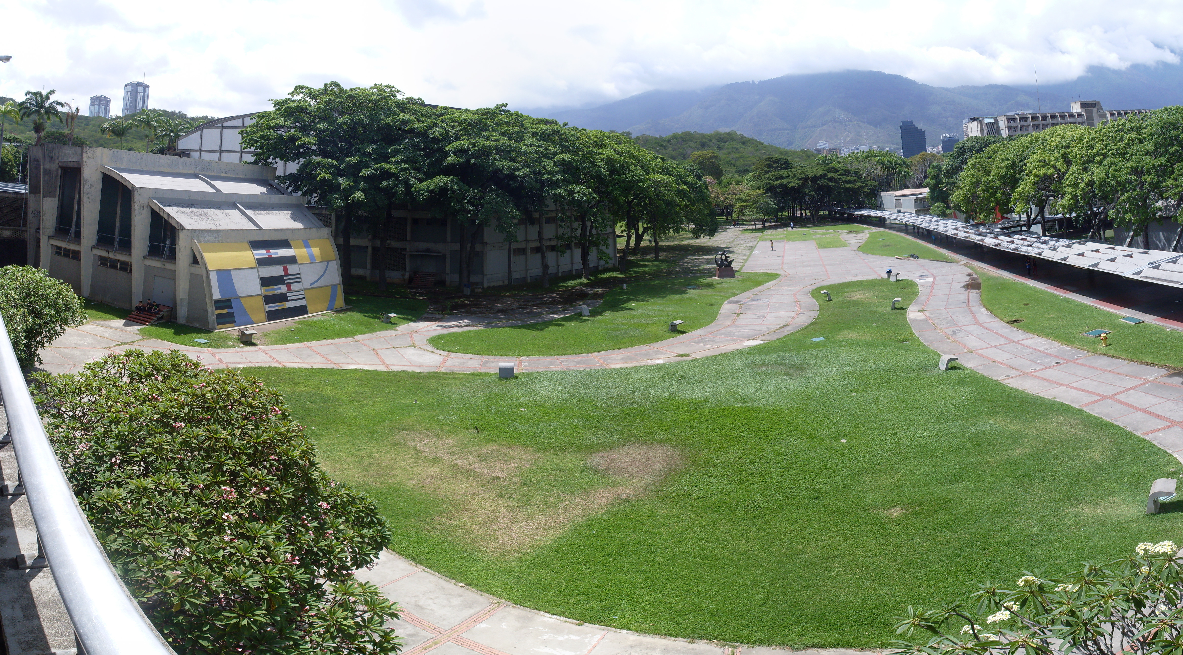 Panorámica de Tierra de Nadie desde la Biblioteca Central. La imagen es una composición de fotos individuales que fueron unidas con el programa Hugin Panorama Stitcher.